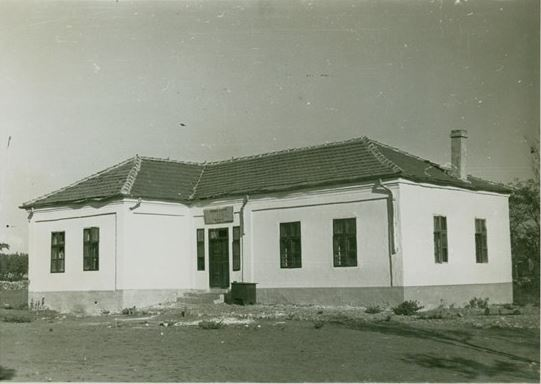 Начално училище в село Било, Добричко.